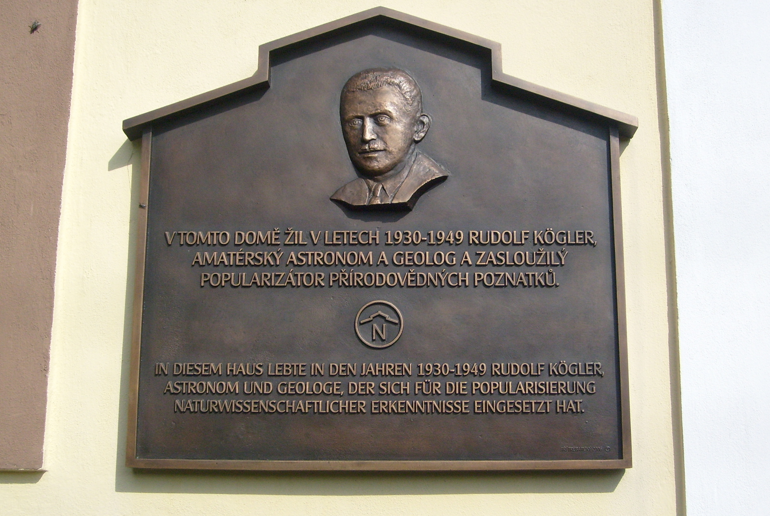 Pamětní deska Rudolfa Köglera v Zahradách (Rytectví Jiří Trebatický 2006)